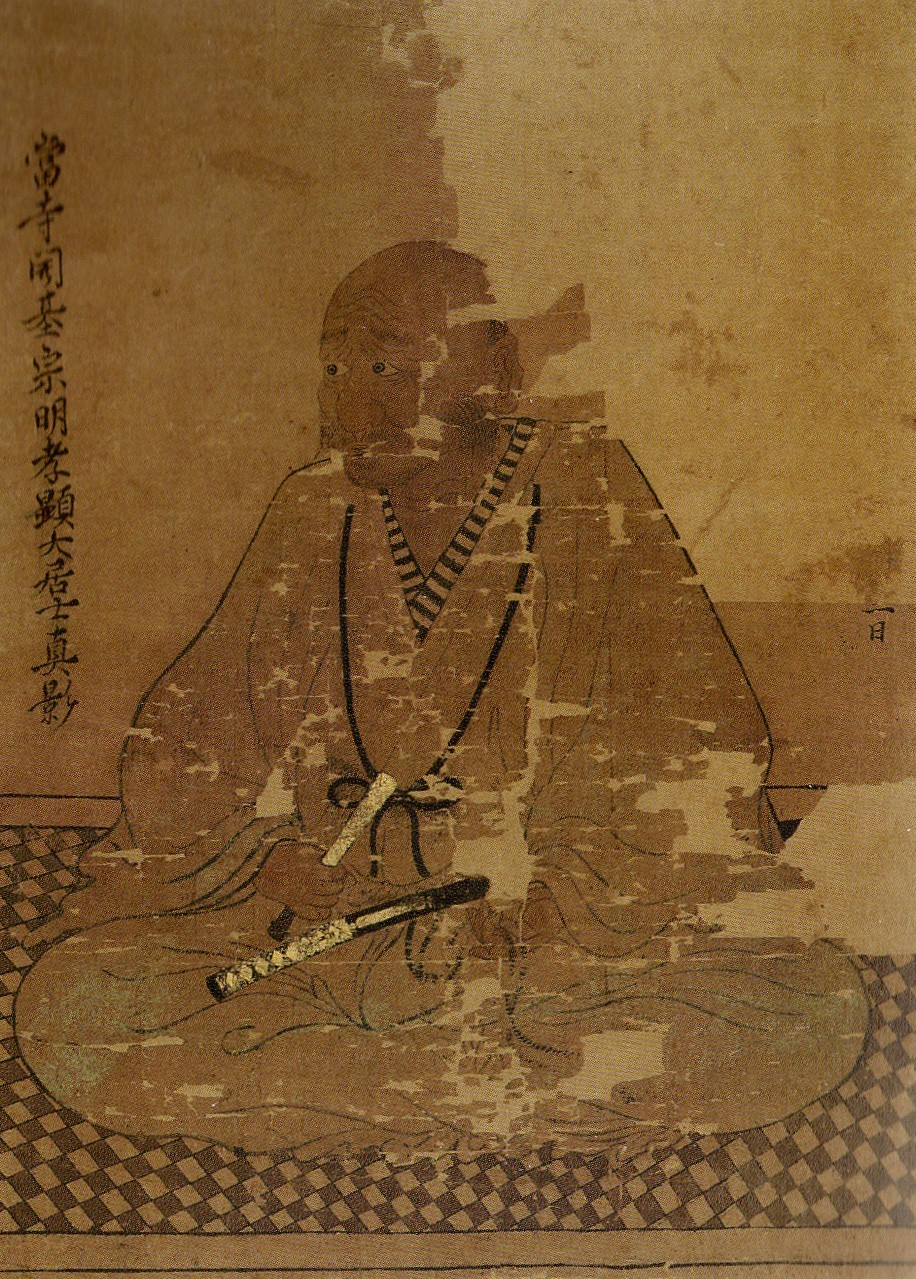 結城政朝と伝わる肖像画。